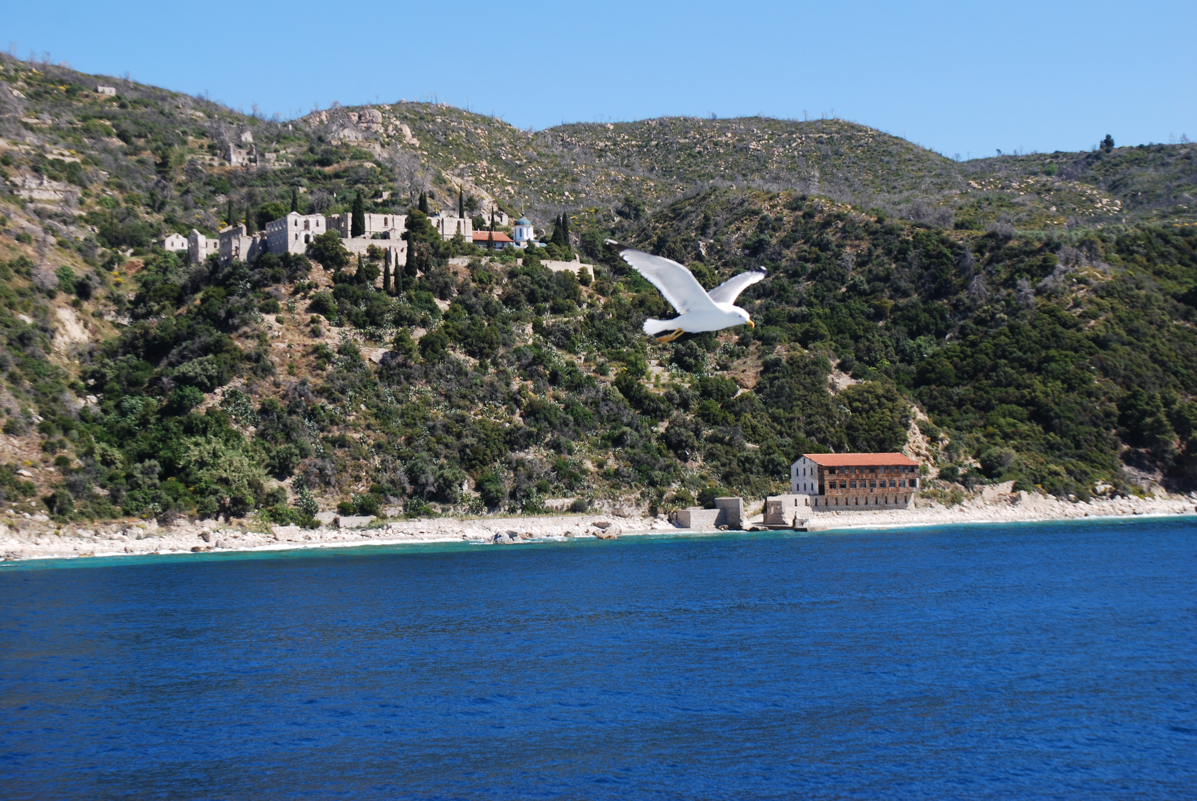 Vue de la croisière le long de la côte Ouest du Mont Athos, à bord du bateau "Kapetan Photis".